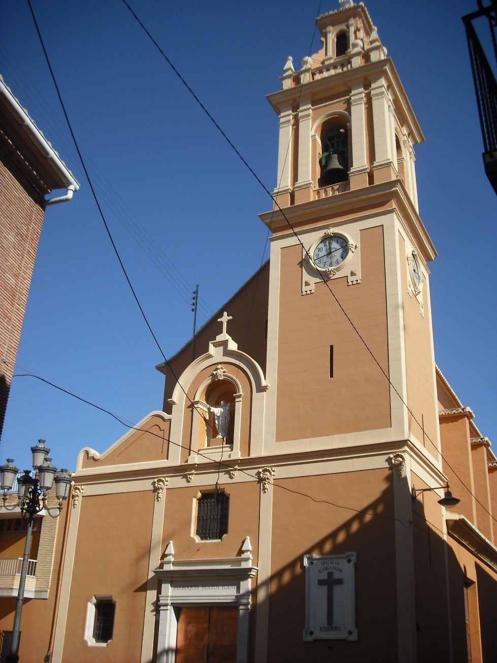 Fachada de la iglesia de los Santos Juanes de Meliana.